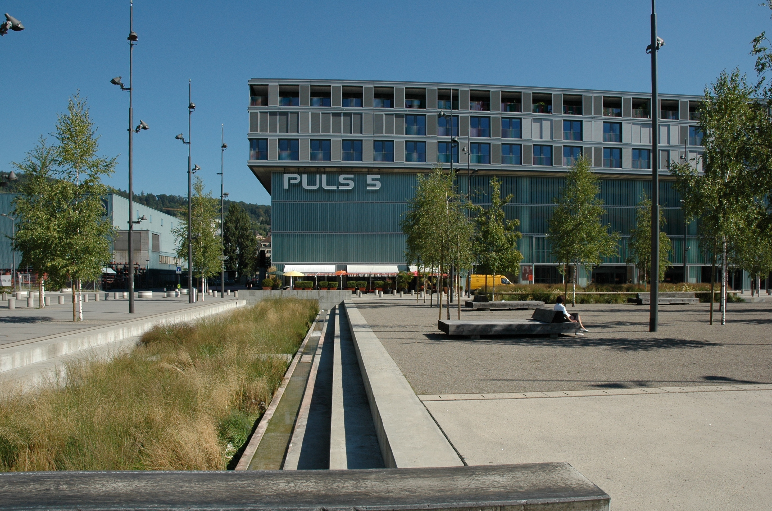 Das Projekt Puls5 in Zürich-West